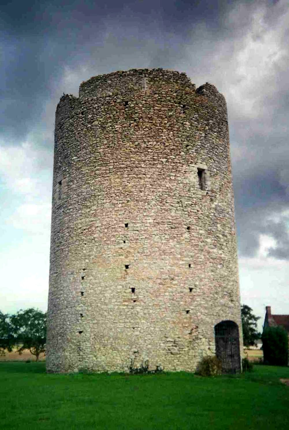 Tour du Brandon (Athée sur Cher -37-)